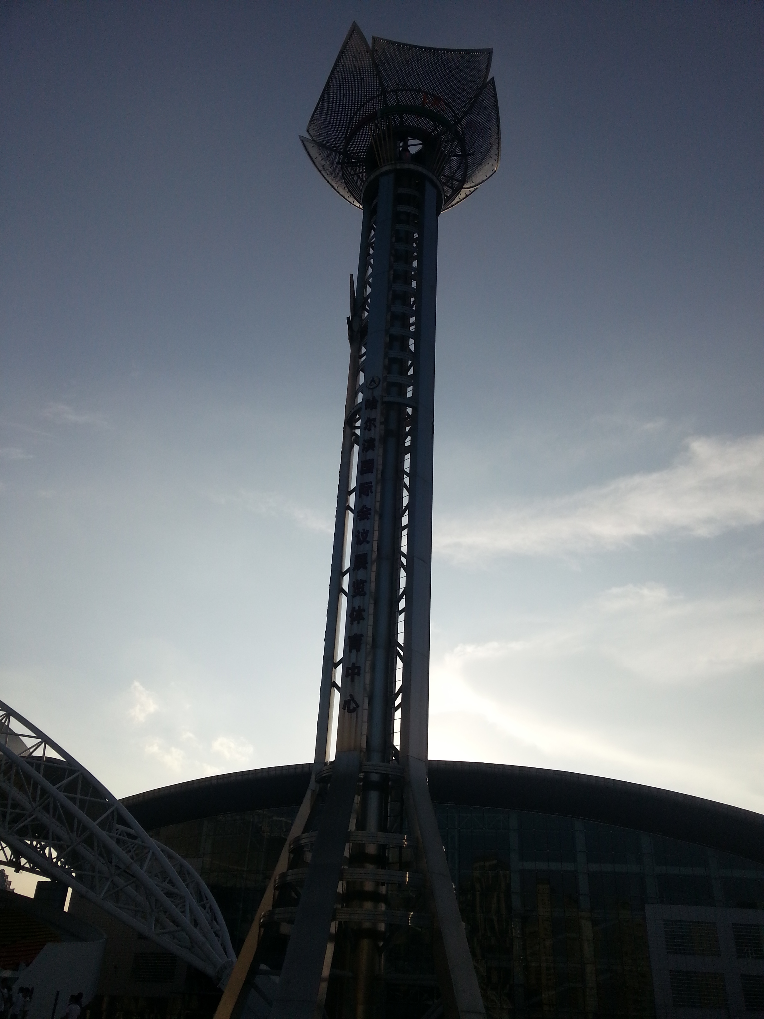 中文（中国大陆）: 哈尔滨国际会议展览体育中心